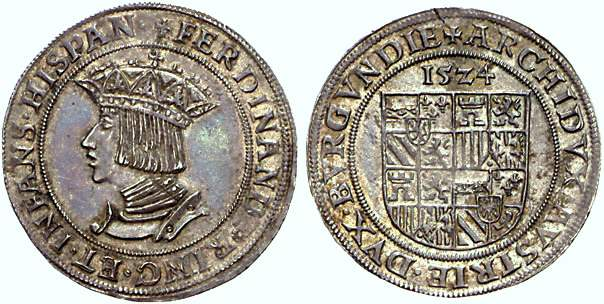 Pfundner del Infante Fernando, Archiduque de Austria